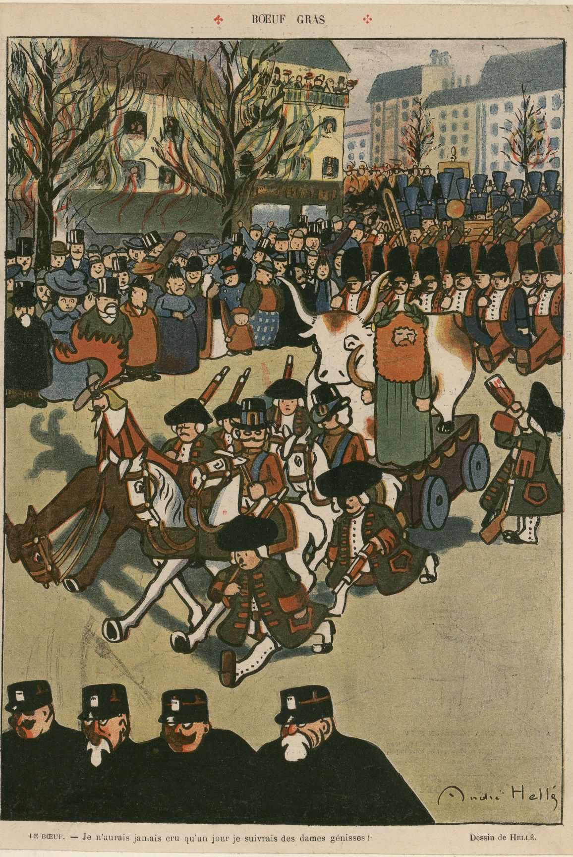 Caricature représentant le cortège parisien du Bœuf Gras.